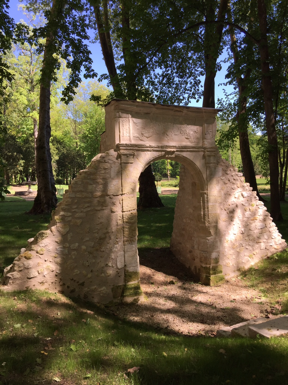 arche